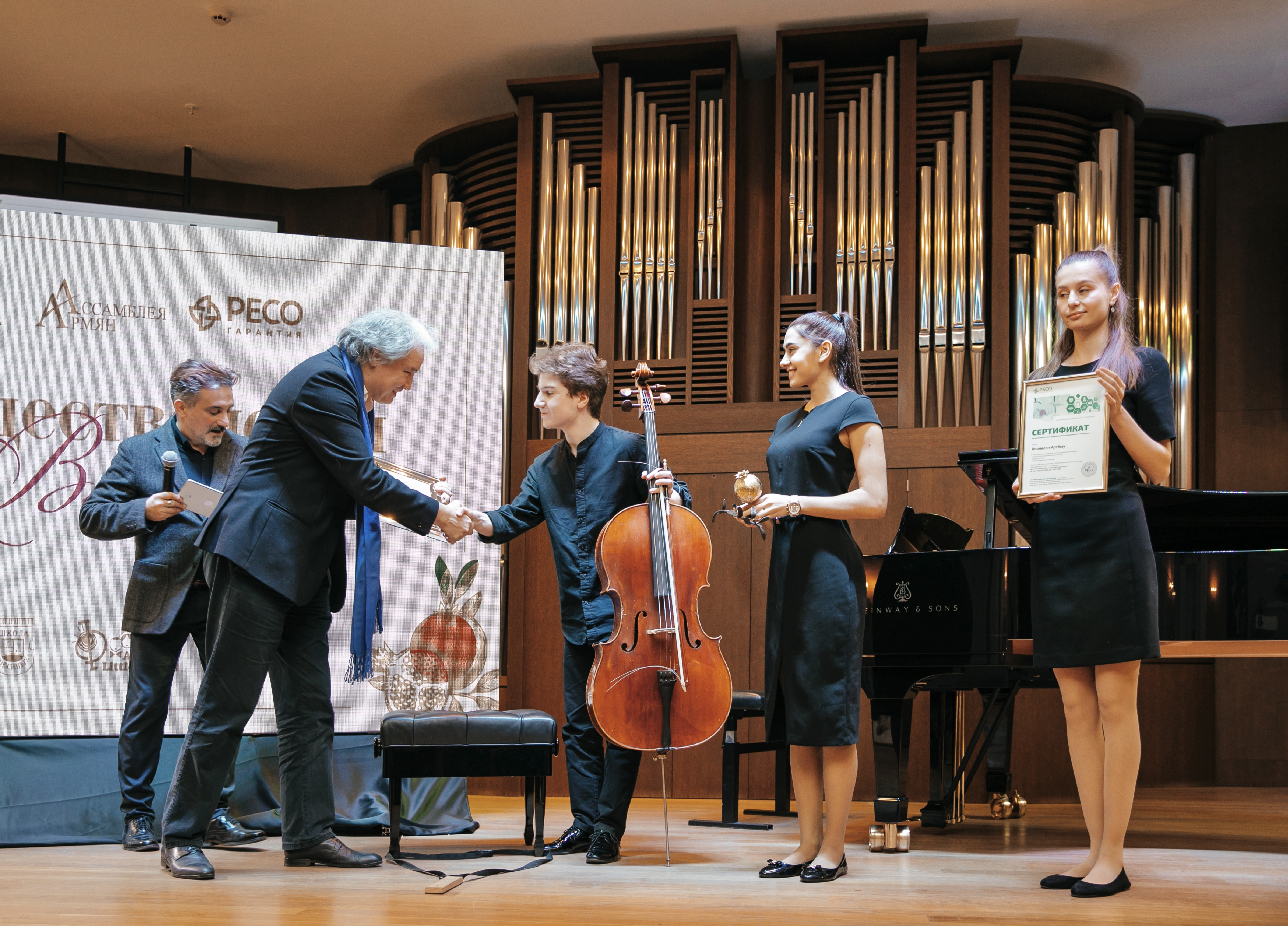 Գնեսինների անվան երաժշտական դպրոցի տնօրենը պարգևատրում է ARMONIA մրցույթի մրցանակակիր Արտյոմ Իոանիսյանին